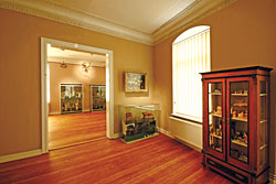 Blick vom Krippen- in das Weihnachtszimmer